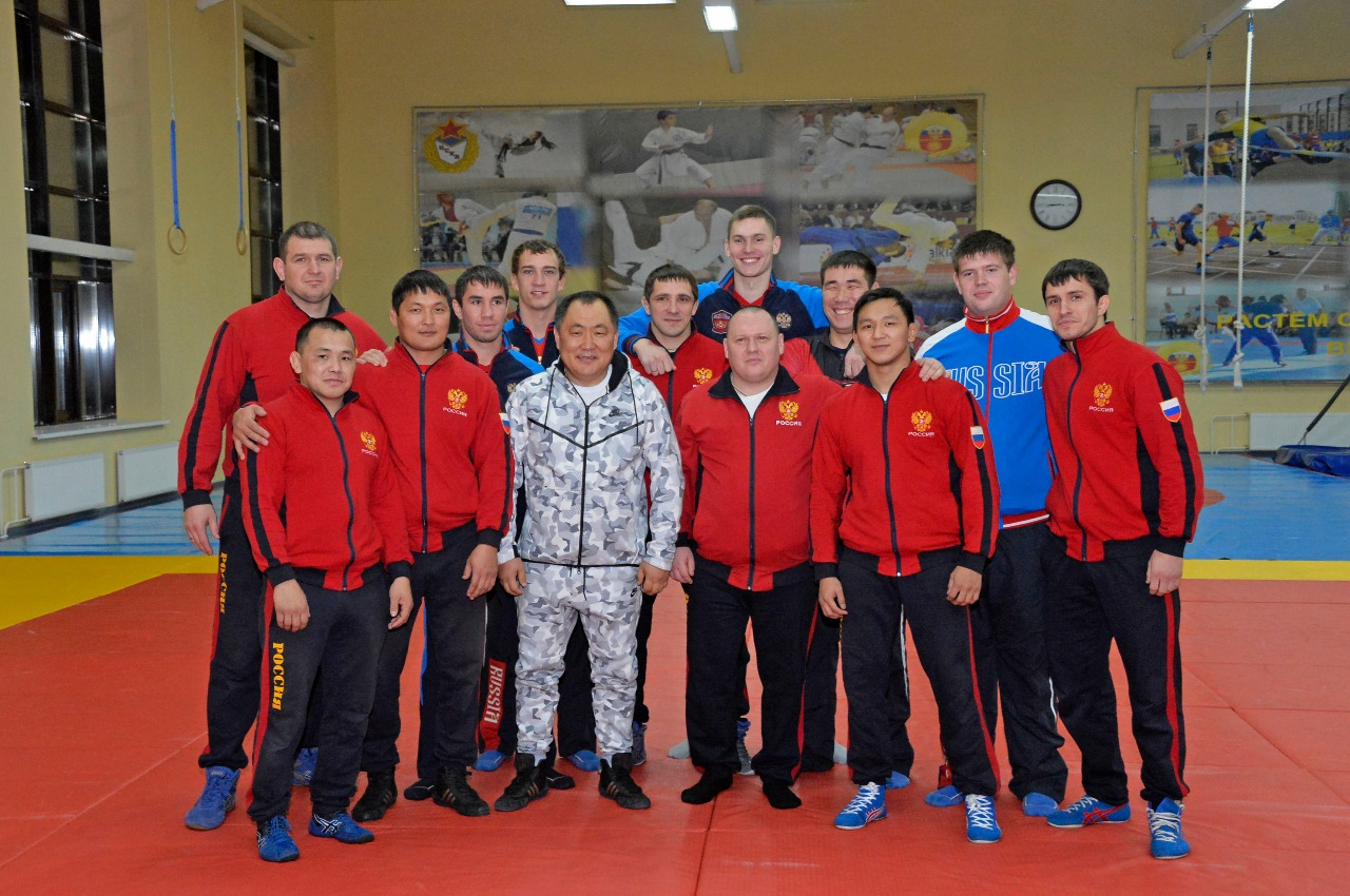 Шолбан Кара-оол с чемпионами ЦСКА. Слева на переднем плане – Омак Сюрюн. Третий справа – Начын Куулар